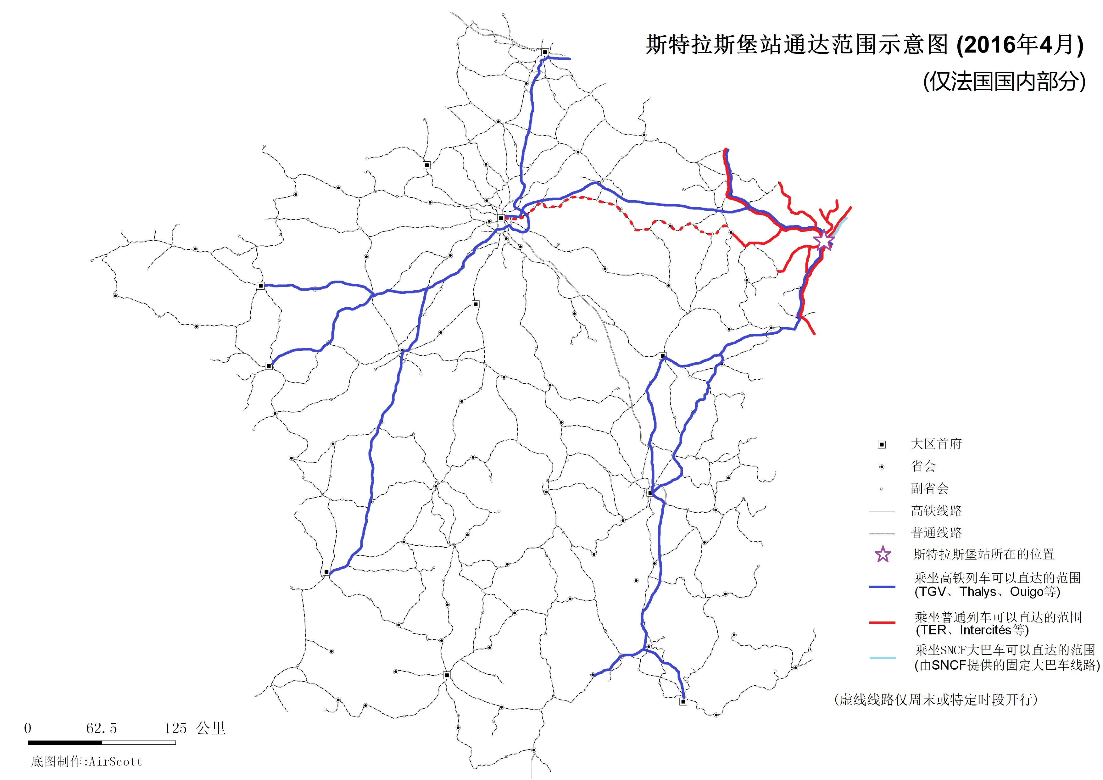 斯特拉斯堡站通达范围示意图 (仅法国国内部分) (2016年4月)